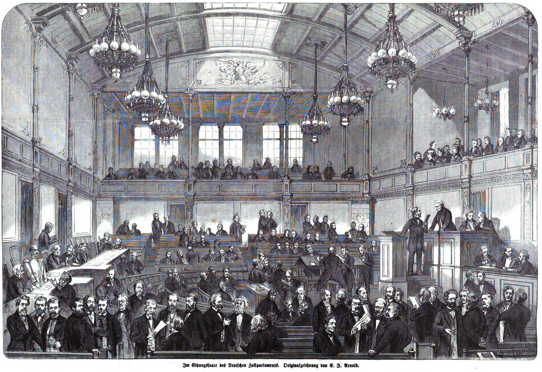 Ansicht des Sitzungssaales des Deutschen Zollparlaments im Palais Hardenberg in Berlin.